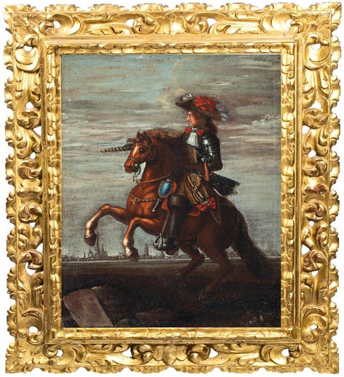 n. La Serena 1637, + La Serena 31 agosto 1717, sepultado con entierro mayor en San Francisco; dueño de la chacras de Cerrillos, Limarí y una viña en el valle de Elqui; tuvo una destacada actuación en la defensa de La Serena contra el pirata inglés Francis Davies 1686; Corregidor de La Serena 1689-1692